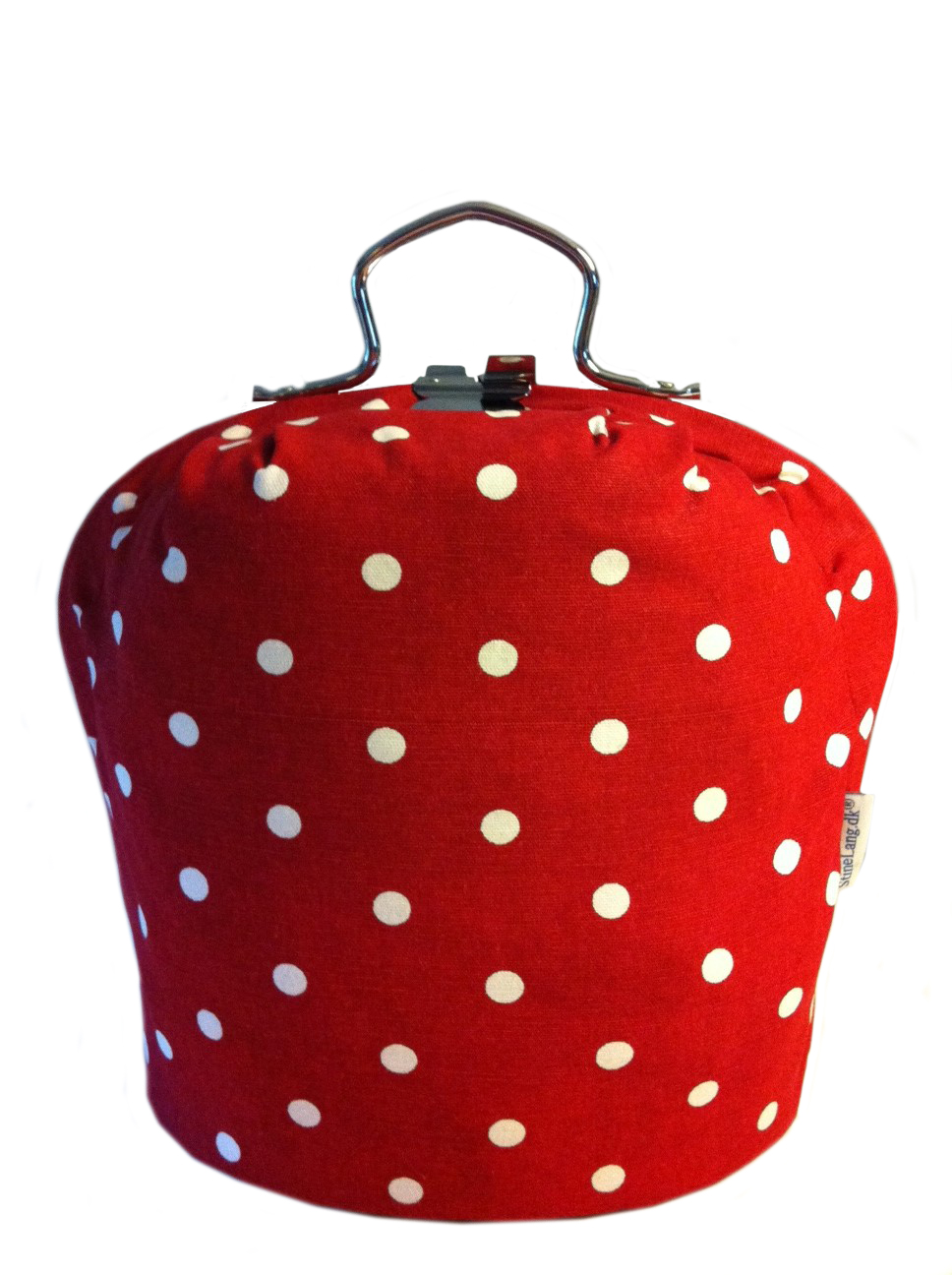 En Thetaske er en form for tehætte med håndtag. Den gør det muligt at flytte tekanden fra køkkenet til serveringsstedet mens tekanden er varm.